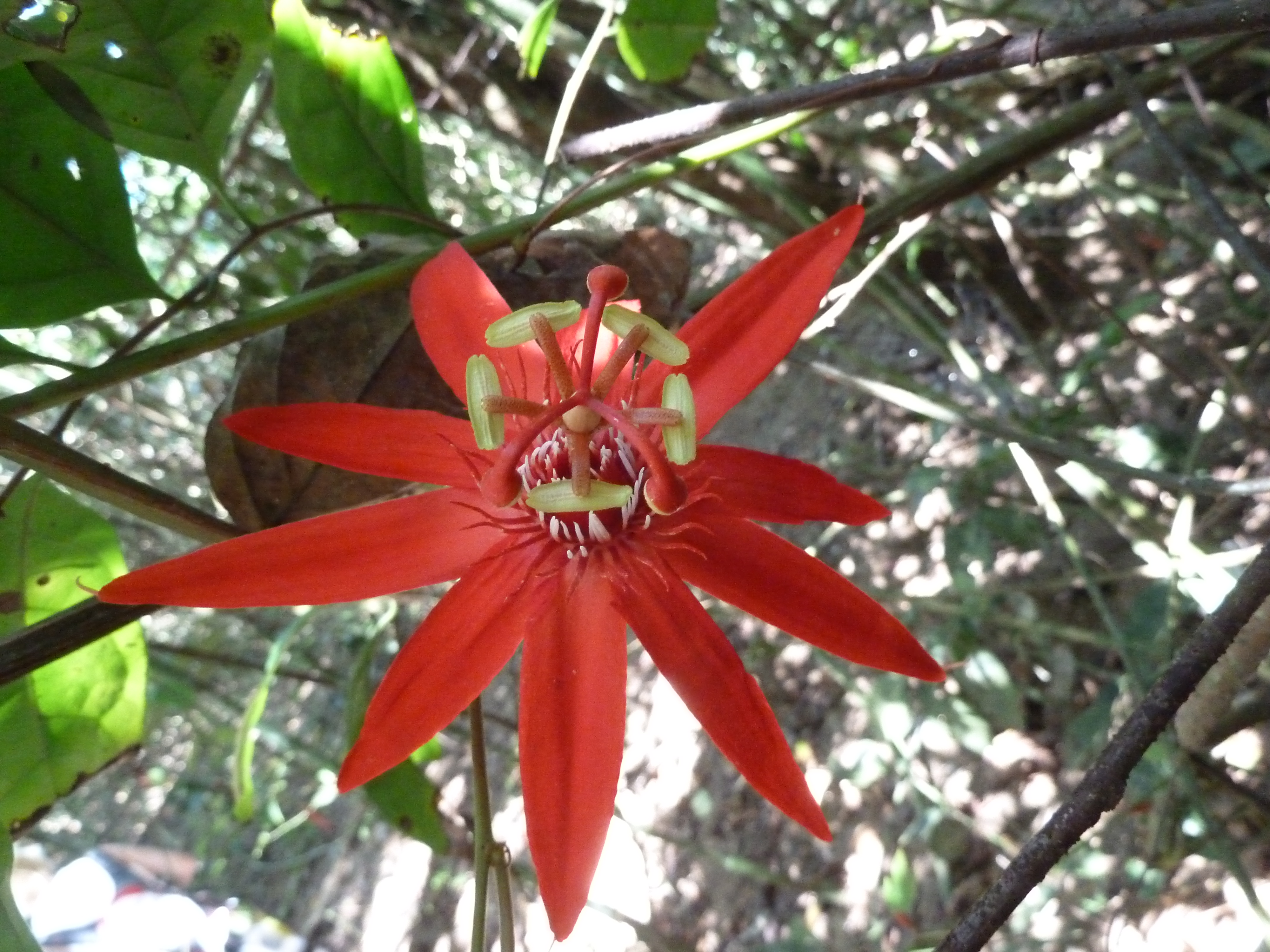 Fleur de la Passiflore à feuille de vigne - Parc Corcovado au Costa-Rica